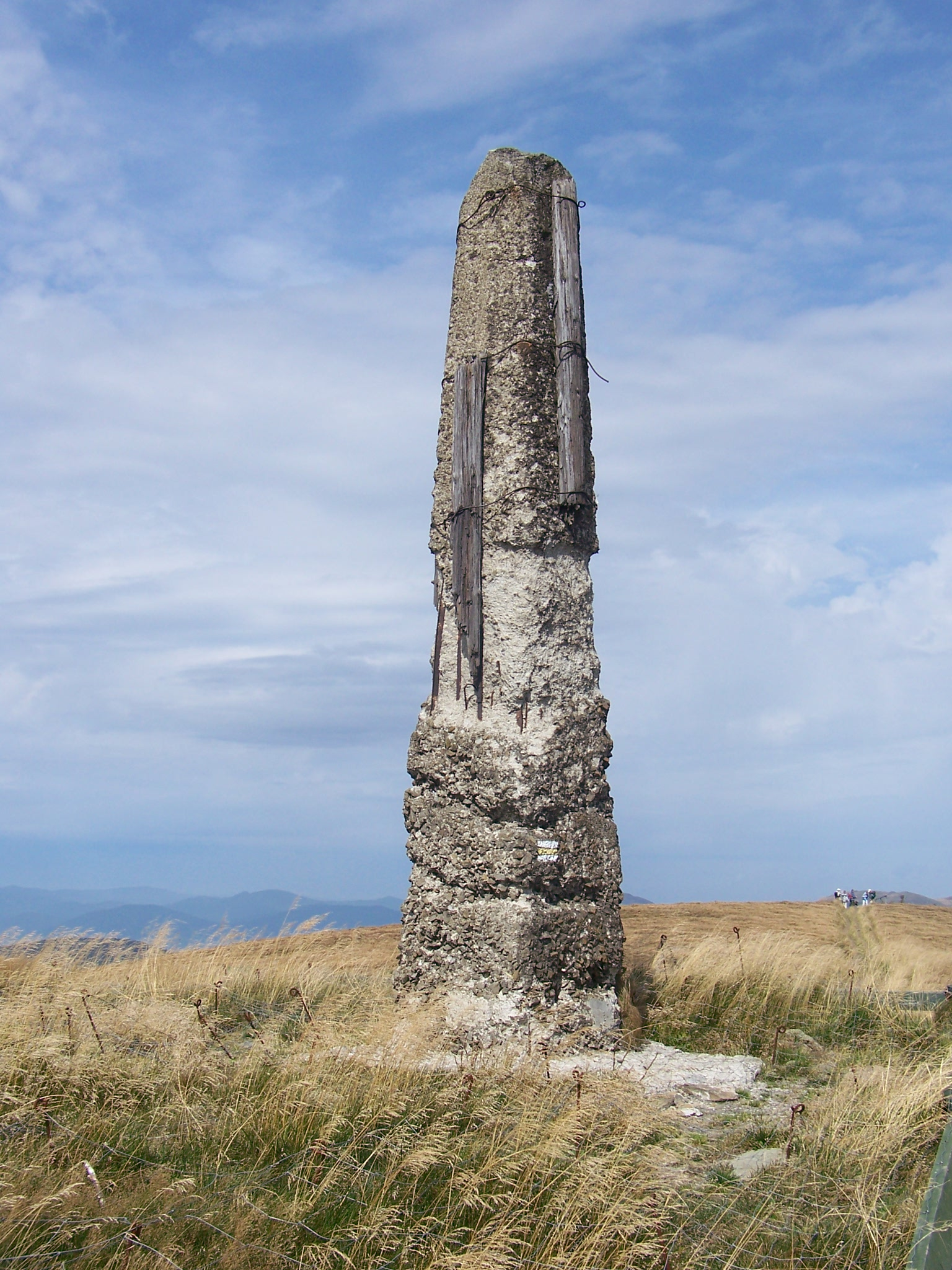 Sloup na kamenném štítě Wielka Rawka